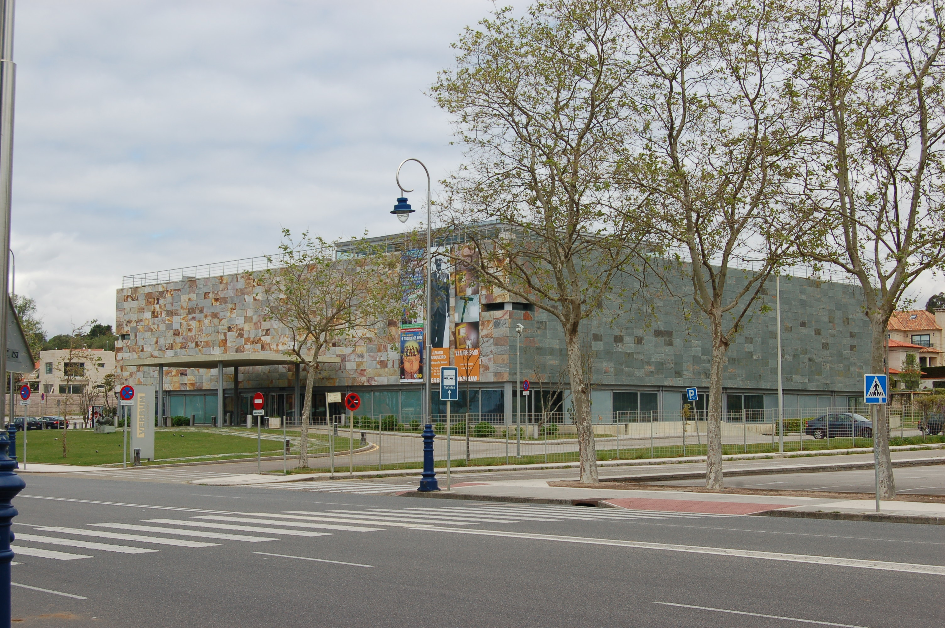 Verbum - Casa das palabras.